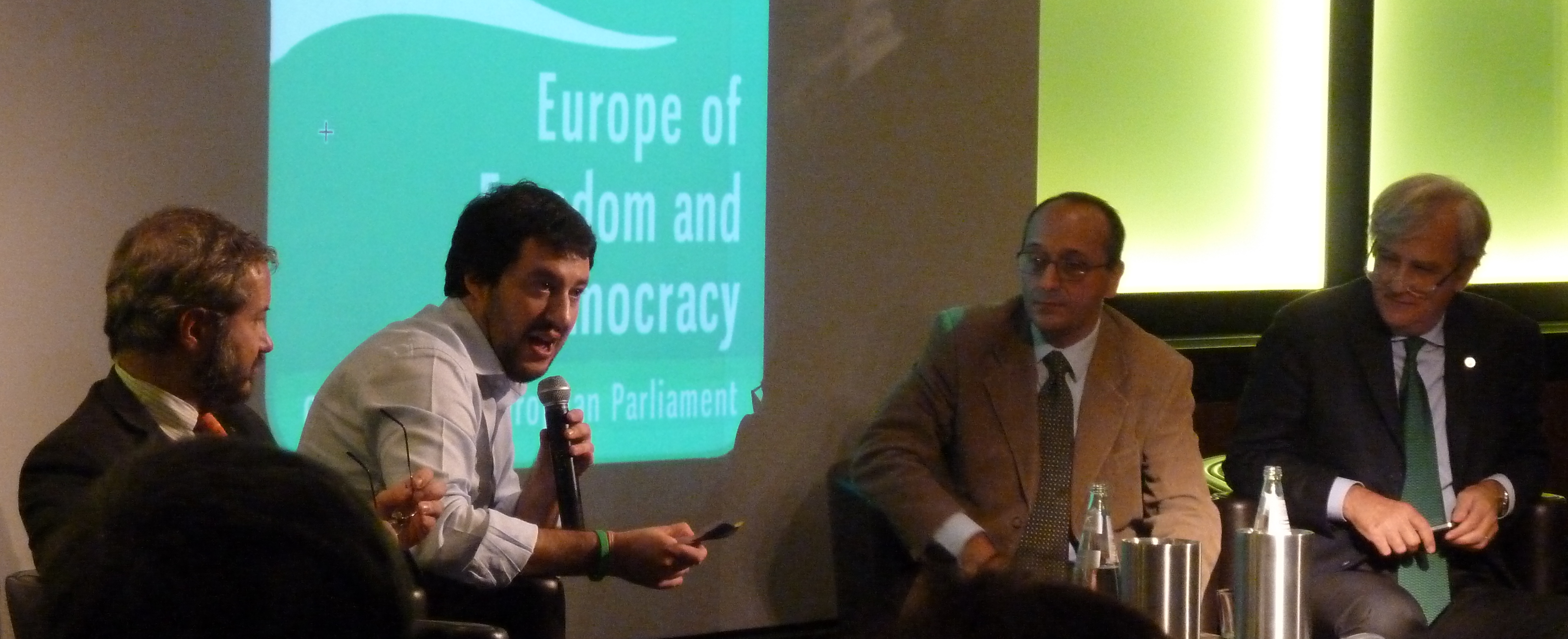 Convegno "No Euro Day" organizzato dalla Lega Nord all'Hotel dei Cavalieri a Milano, il 23 novembre 2013. Organizzatore, l'eurodeputato Matteo Salvini, mentre gli ospiti sono stati i professori Claudio Borghi, Antonio Rinaldi e Alberto Bagnai.